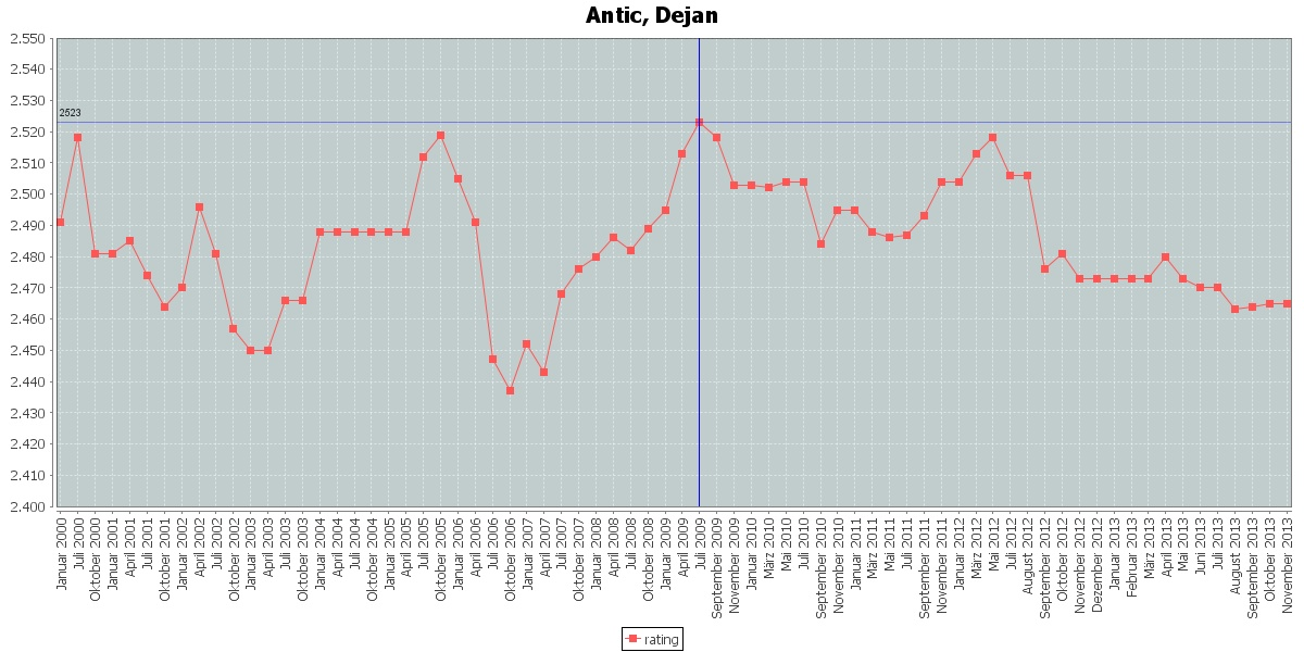 Антич, Деян (род.1968) — сербский шахматист, гроссмейстер (1999).